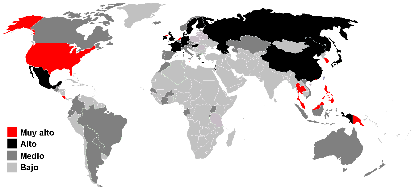 Mapa. Porcentaje de exportaciones de alta-tecnología sobre el total de exportaciones de cada país. Map. High-technology exports as rate on total exports of each country. Cada país según el porcentaje de las exportaciones totales que son bienes de alta tecnología. Very high (31-100%) High (16-30%) Medium (6-15%) Low (0-5%) Fuente de los datos: Banco Mundial 2003 Data Source: World Bank 2003 Nota: Algunos países carecen de datos. There is no data for some countries.